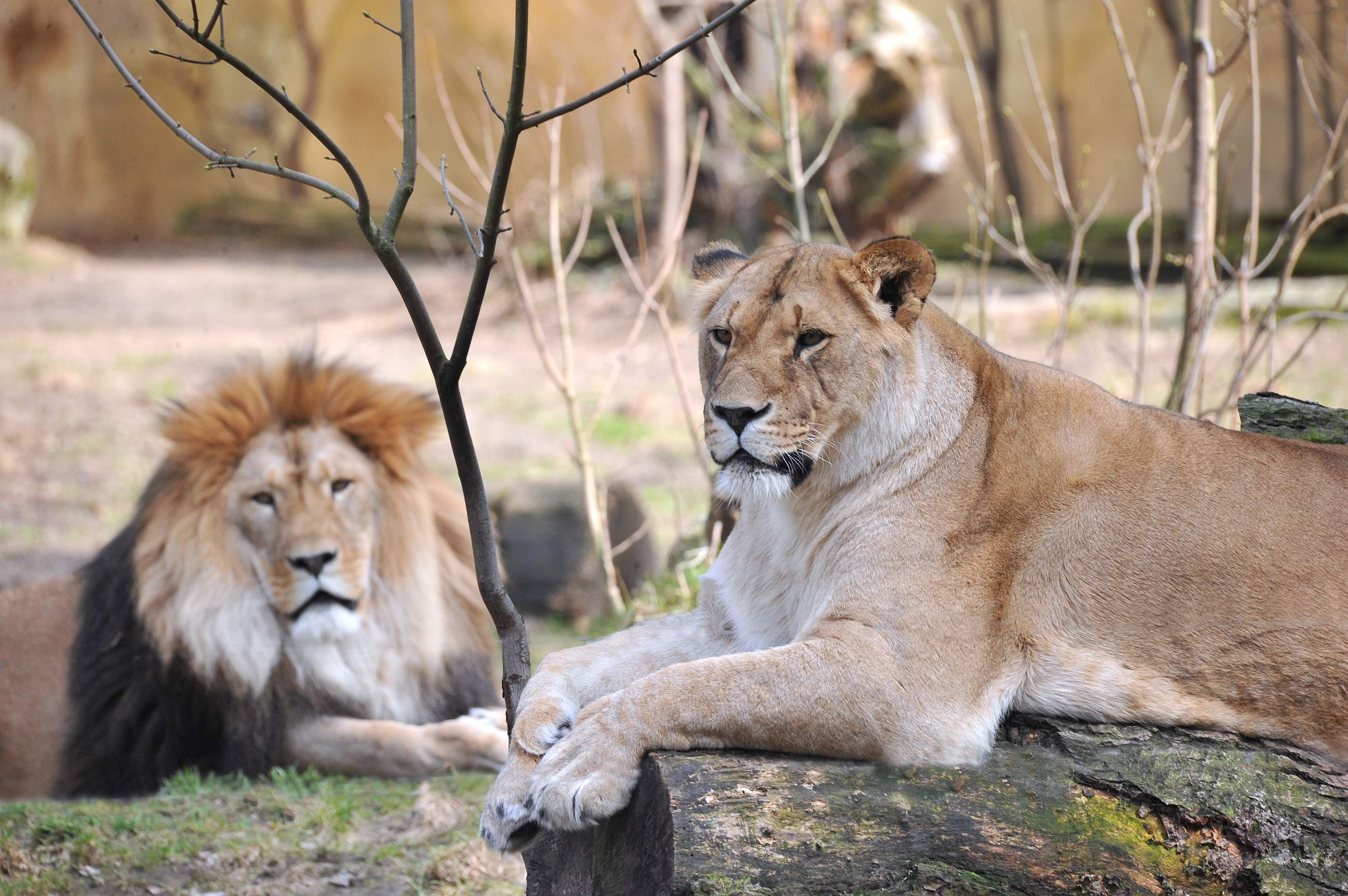 Zoo Rostock